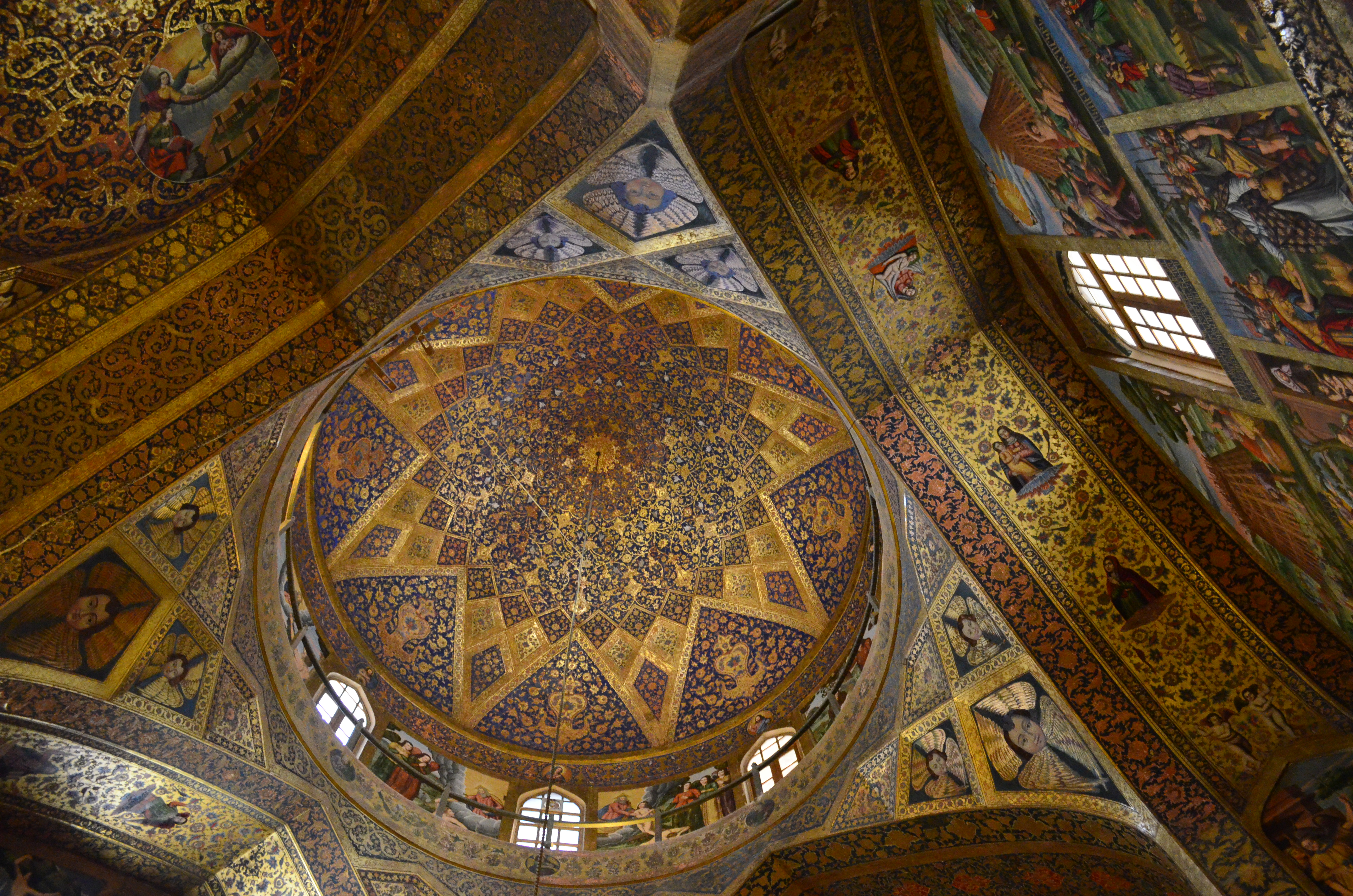 کلیسای وانک، اصفهان، ایران